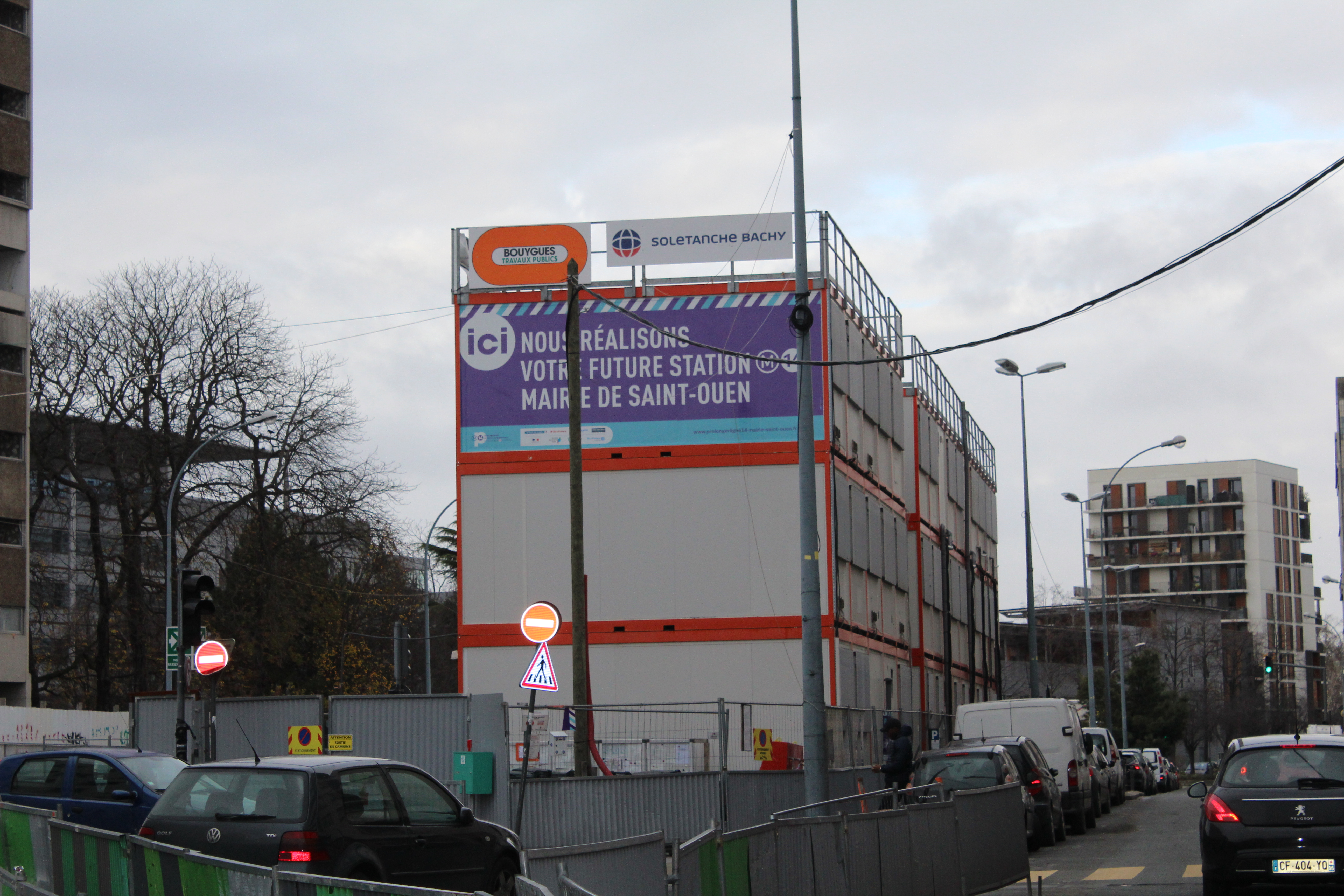 Chantier de la station de métro "Mairie de Saint-Ouen" pour l'extension de la ligne 14 du métro parisien, Saint-Ouen, Seine-Saint-Denis.